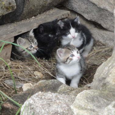 Endroit où une portée de quatre chatons a été cachée par leur mère.